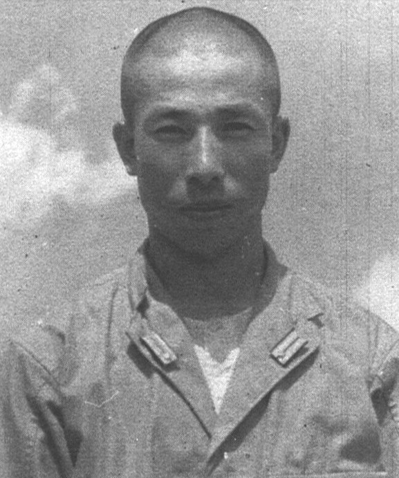 少佐時代の中島正